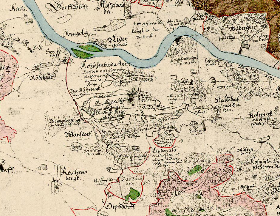 Ausschnitt der Lößnitz aus: Tafel IX aus Oeder, Matthias: Die erste Landesvermessung des Kurstaates Sachsen Auf Befehl Des Kurfürsten Christian I. ausgeführt von Matthias Oeder (1586-1607) ; Zum 800Jährigen Regierungs-Jubiläum Des Hauses Wettin. Stengel & Markert, Dresden 1889.